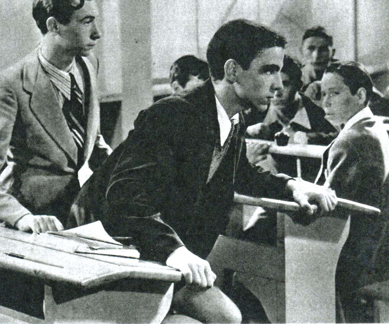 Piccoli naufraghi - Calzavara 1939 - foto scena